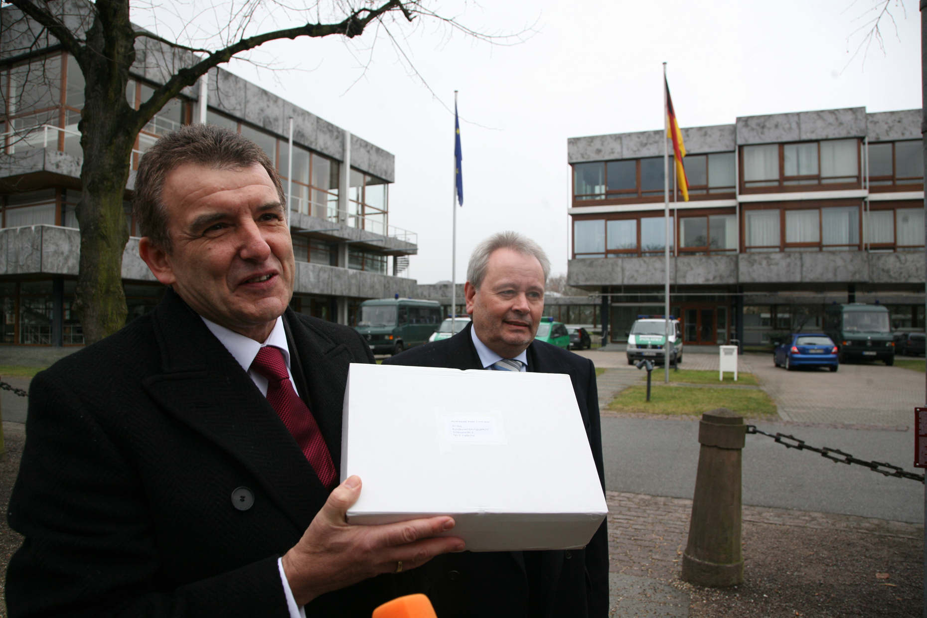 RA Meinhard Starostik und Steuerberater Heinz Raschdorf mit den ersten Sammelbeschwerden zur Vorratsdatenspeicherung zum Bundesverfassungsgericht, 31. Dezember 2007, 12h.